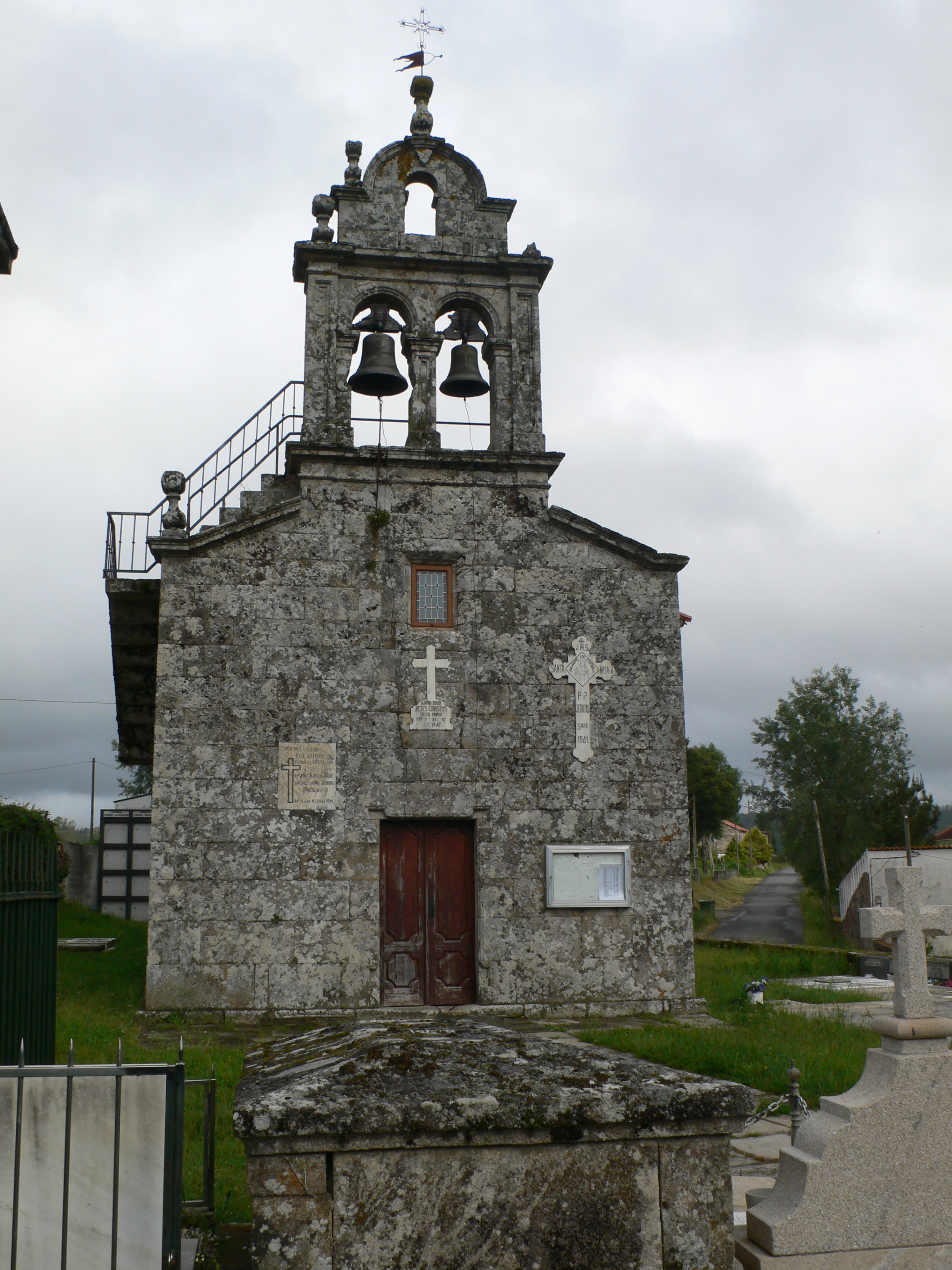 Igrexa de San Martiño de Rellas, Silleda